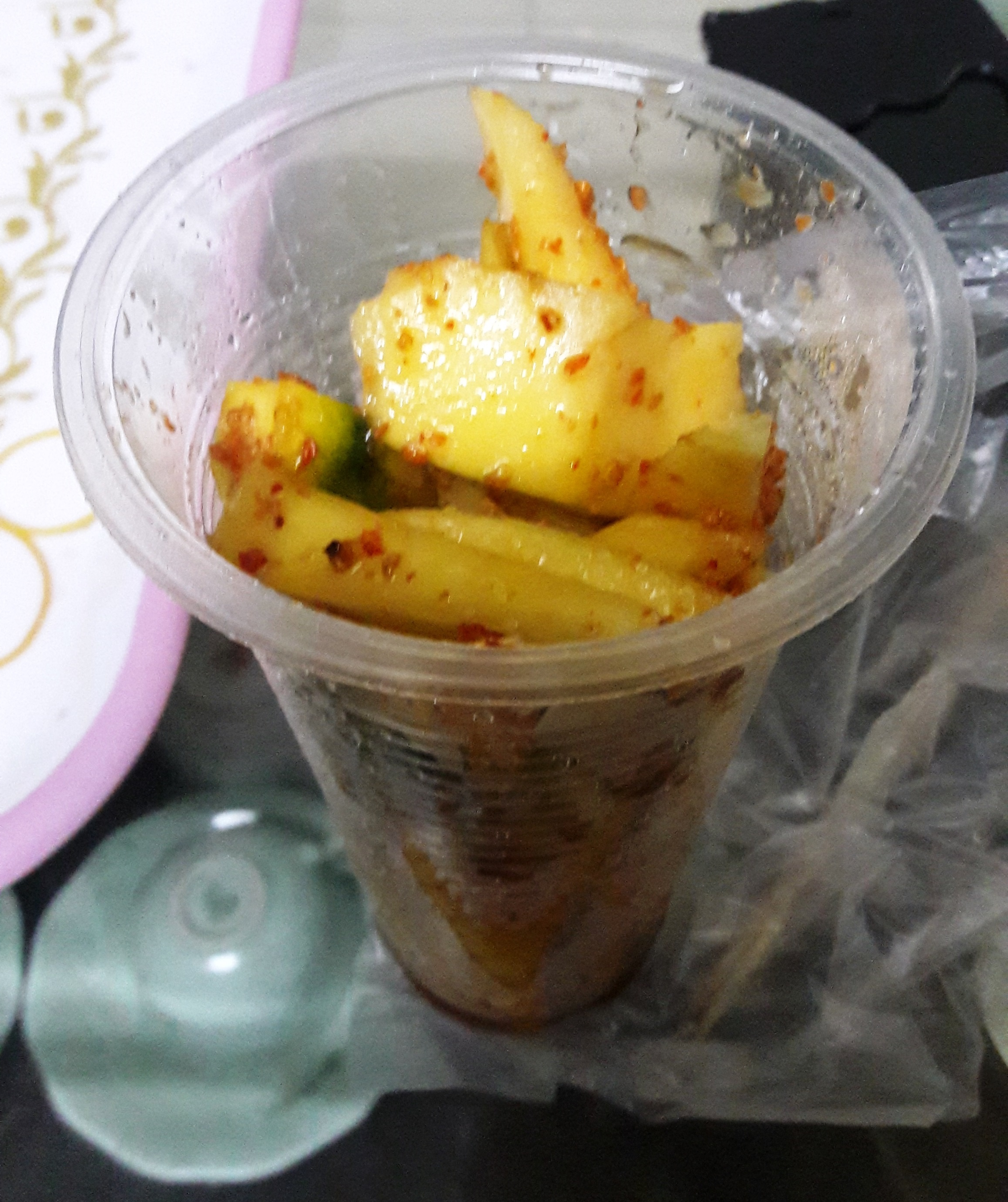 Cuisine of Vietnam